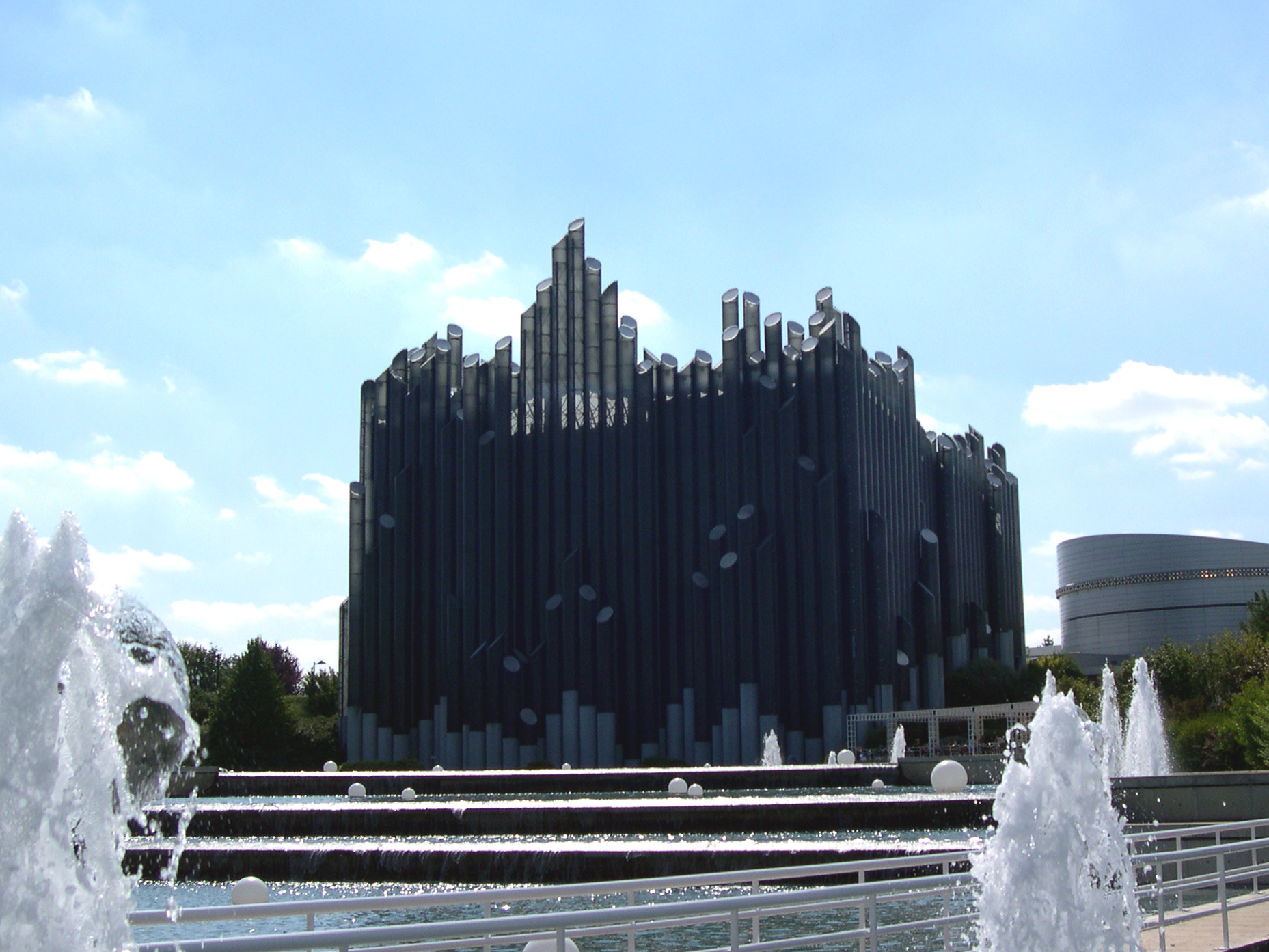 L'orgue du Tapis Magique derrière une série de fontaines au Futuroscope. Photo prise en août 2006.